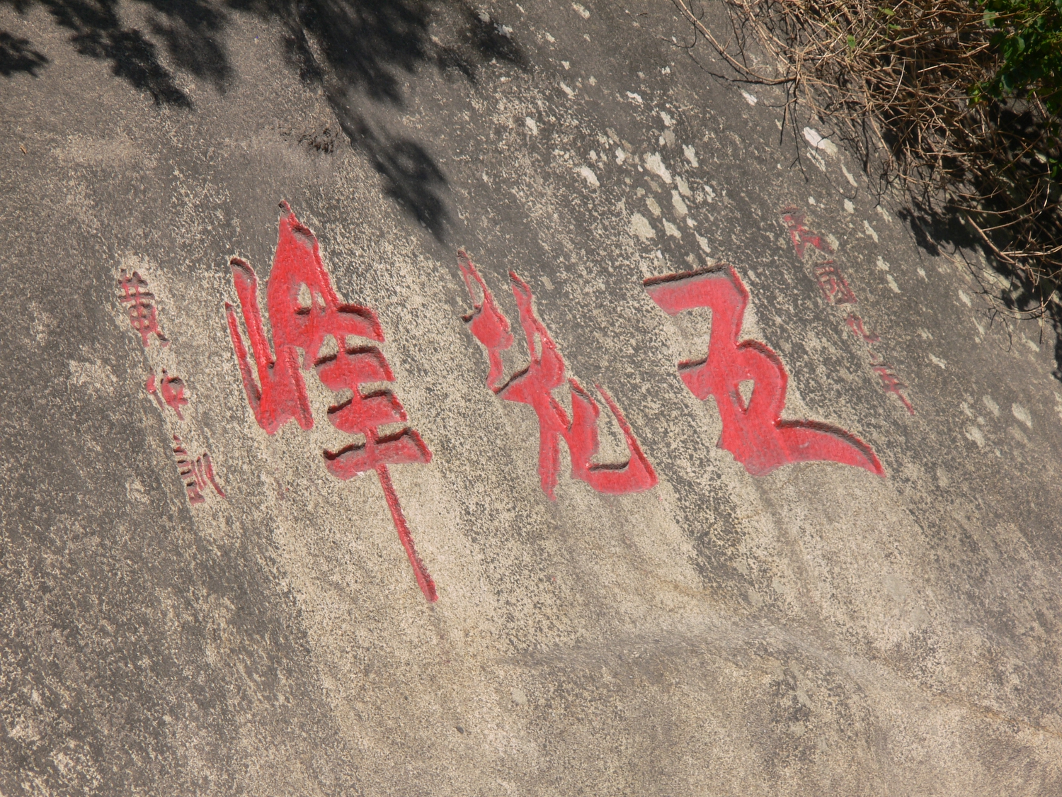 Wulao peak, Xiamen五老峰